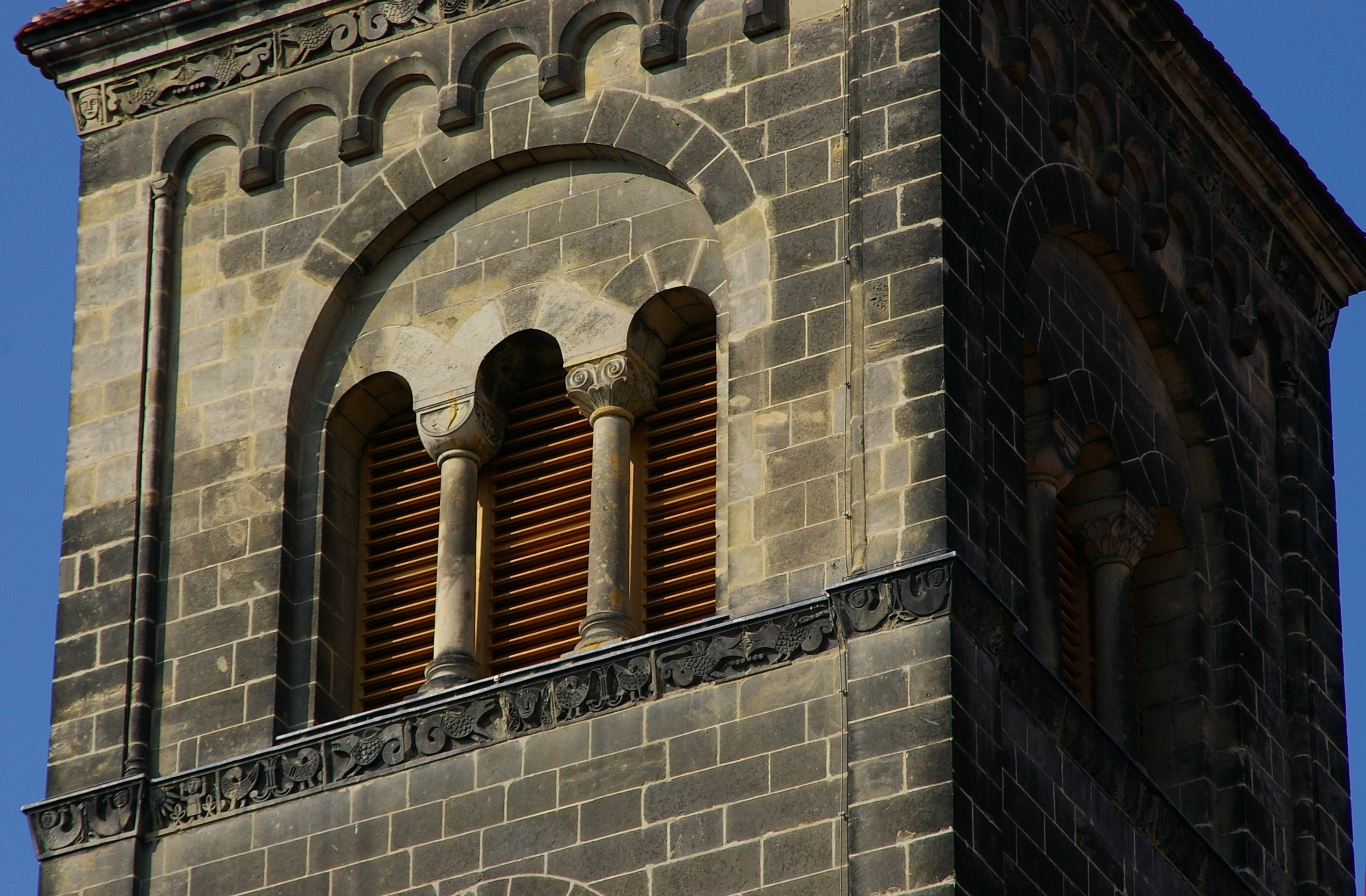 Quedlinburg - Stiftskirche - Turmdetail mit Fries